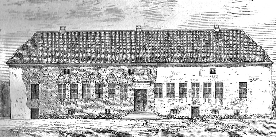 Dueholm Kloster ligger i Nykøbing Mors. De gamle klosterbygninger huser i dag Morslands historiske museum. Dueholm kloster var oprindelig et Johanniterkloster etableret omkring 1370.